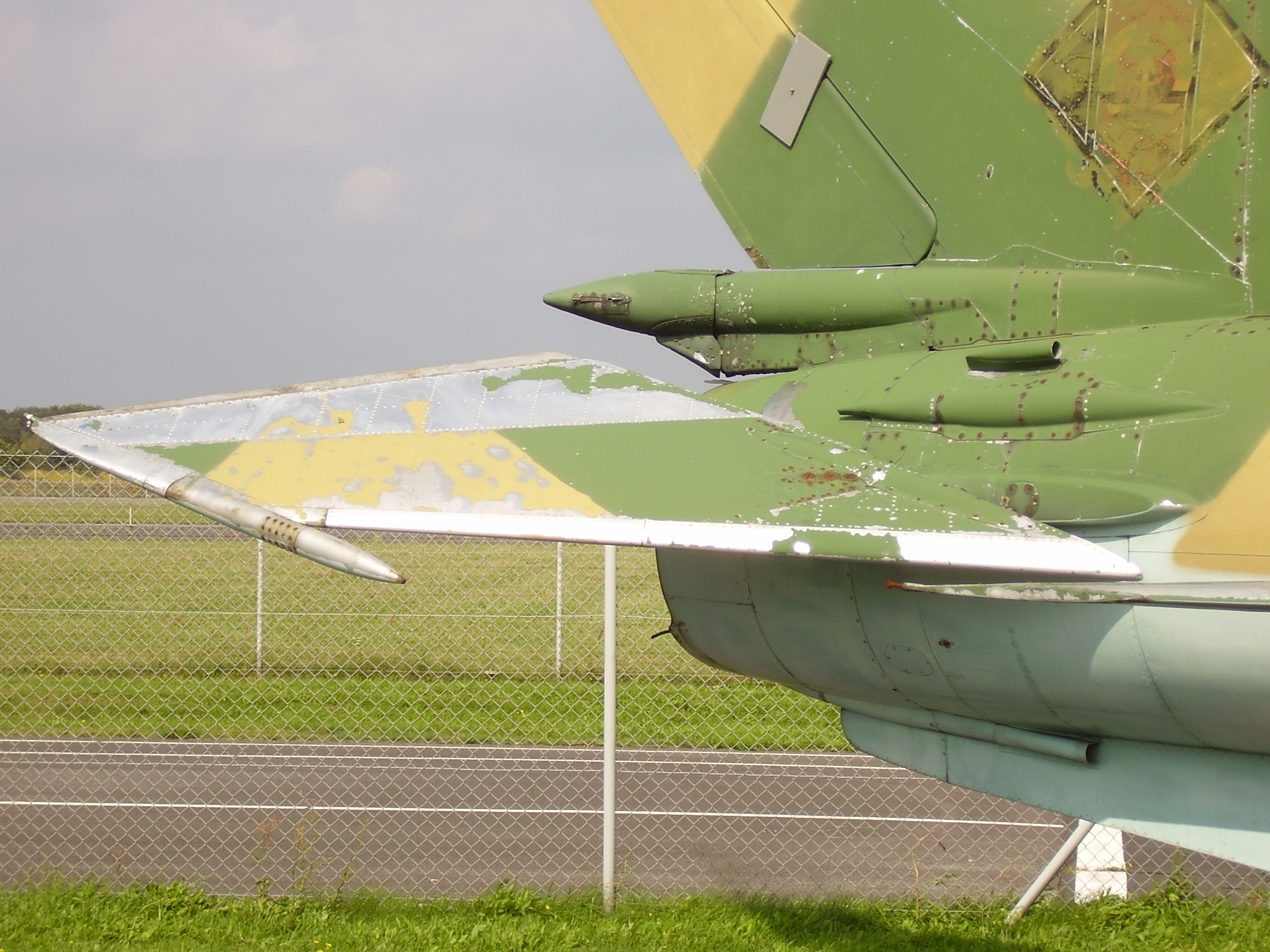 Luftwaffenmuseum der Bundeswehr; Airforce Museum of the Bundeswehr; Berlin-Gatow, MiG-21M